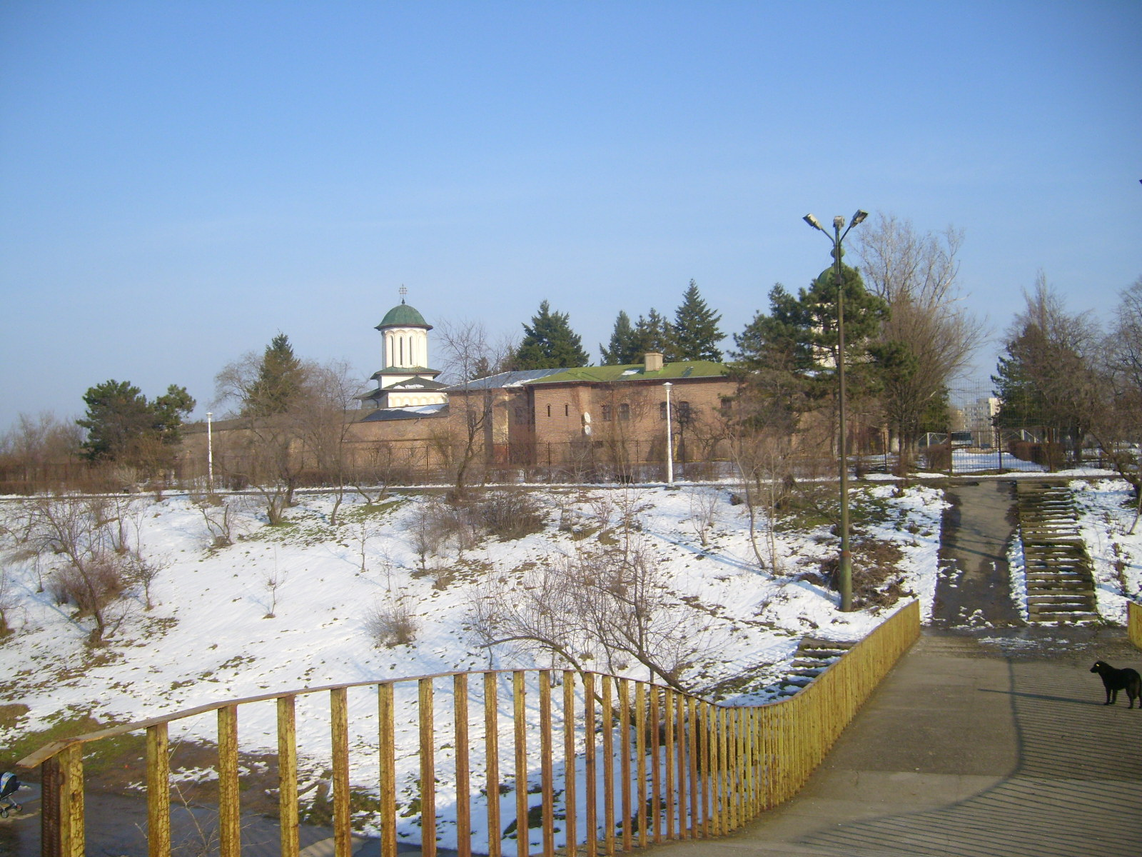 Ansamblul manastirii Plumbuita